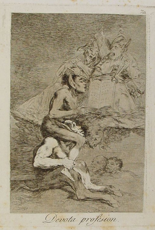 Capricho nº 70: Devota profesión de Goya, serie Los Caprichos